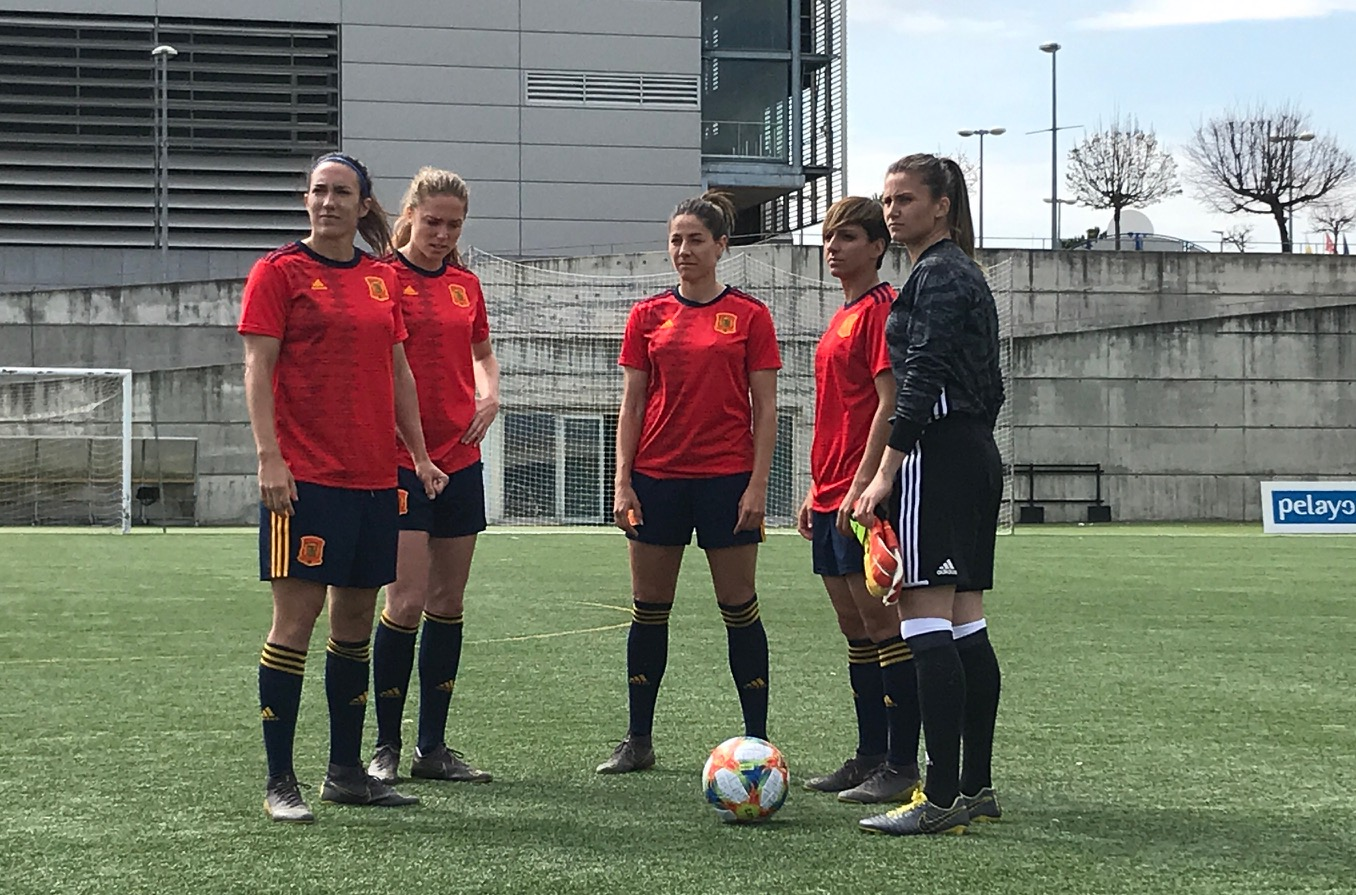 Jugadoras de la Selección Española de Fútbol, entrenando en los campos oficiales